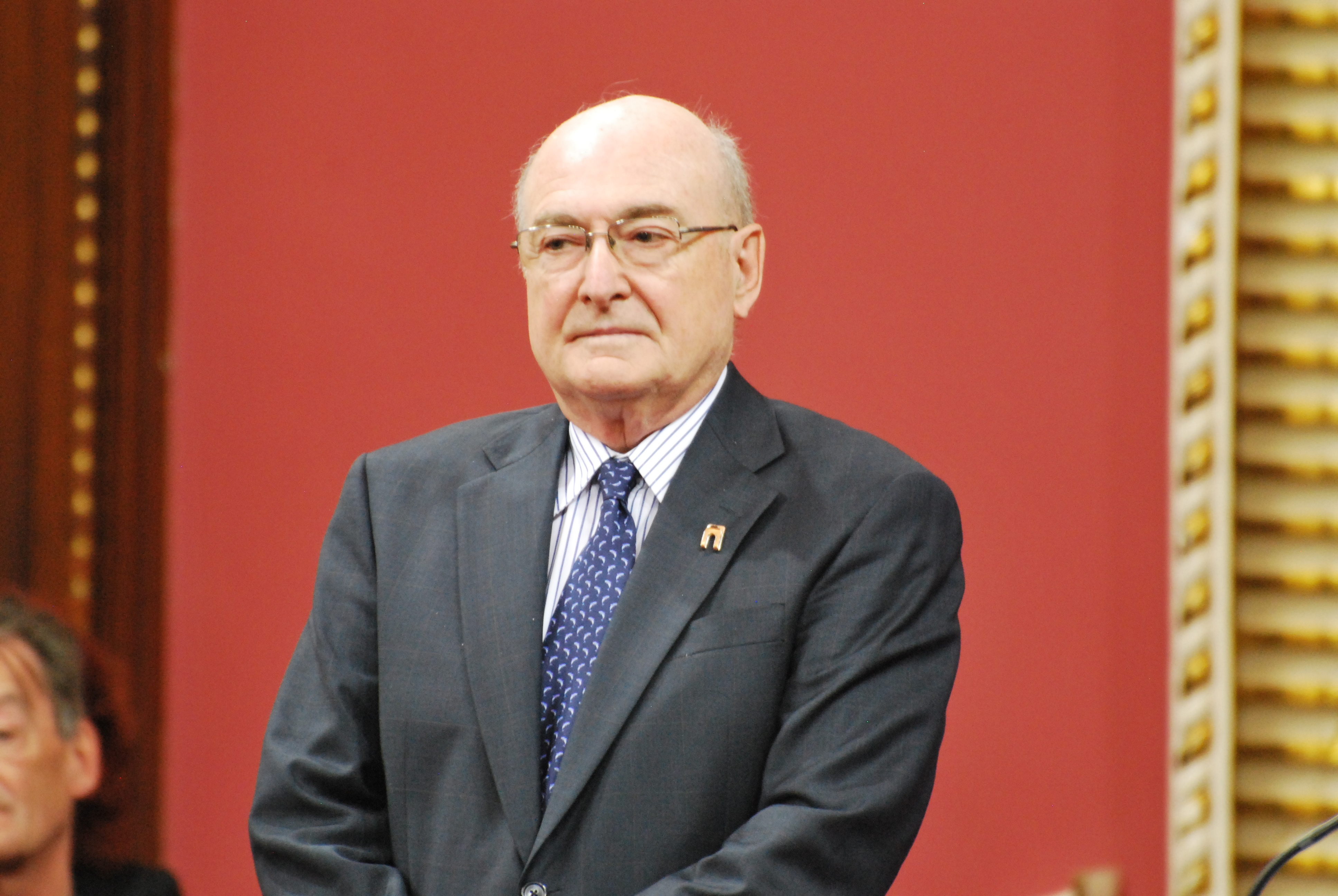 Cérémonie de remise de l'ordre national du Québec 2013.